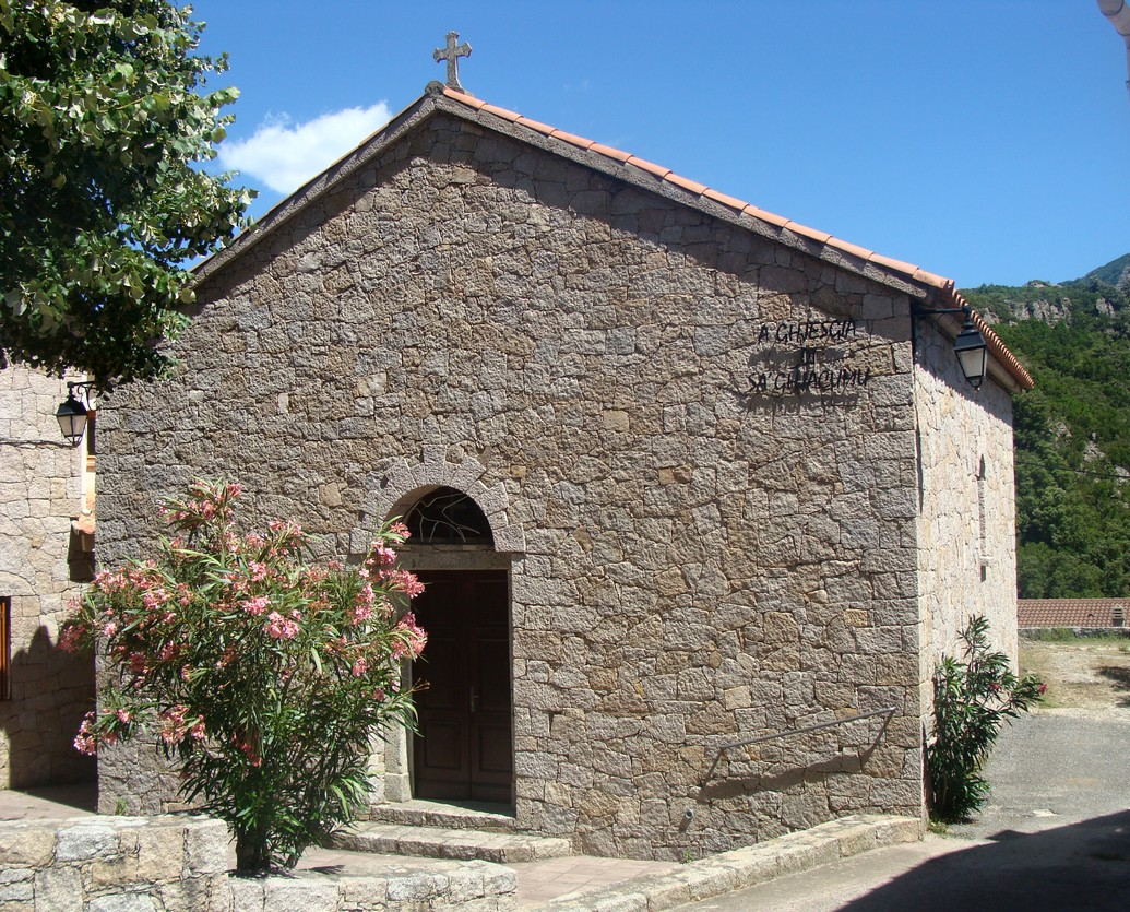 A Ghjesgia San Ghjacumu (église Saint-Jacques) de Chisa (Haute-Corse), vue extérieure.